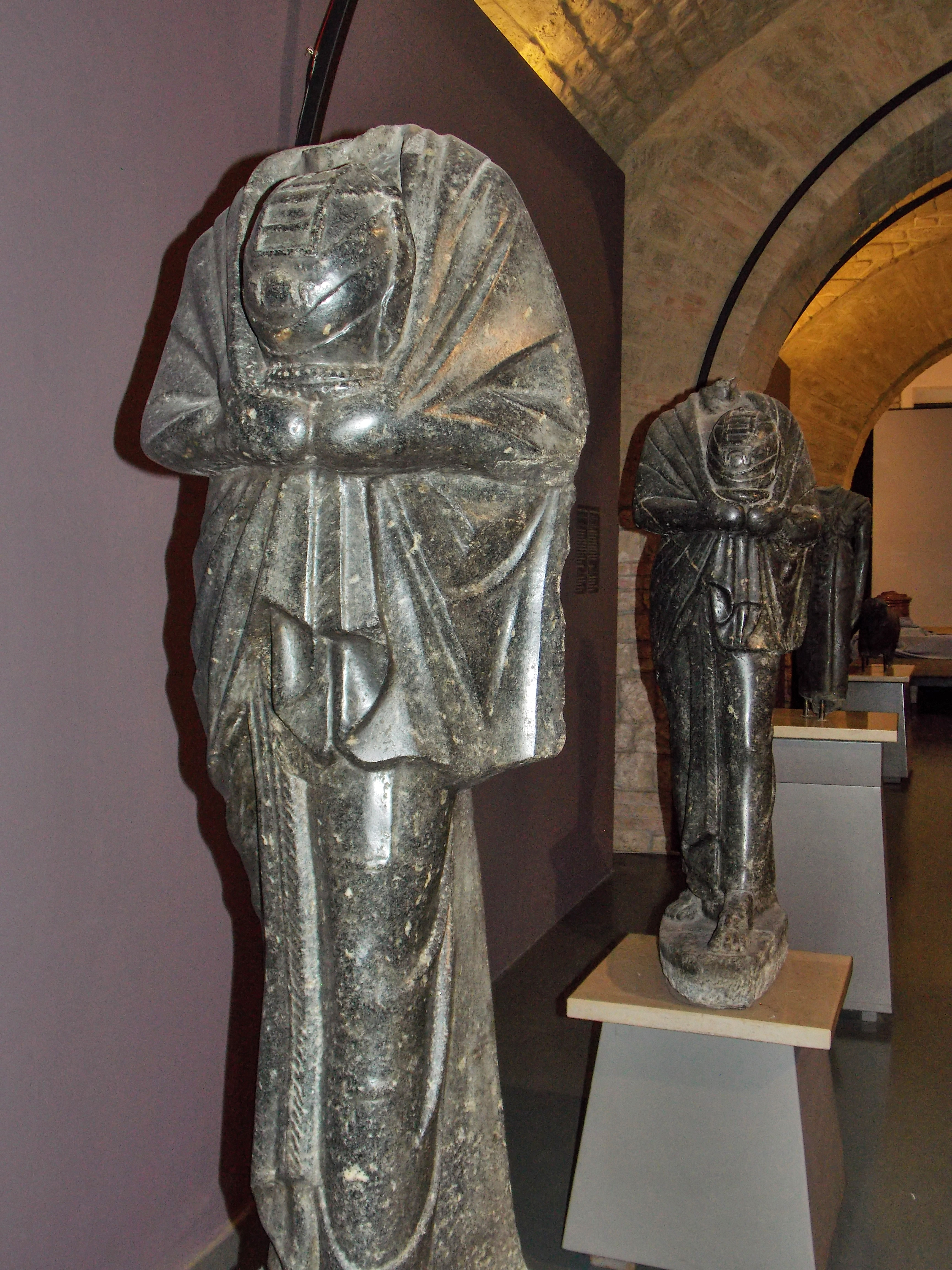 Un reperto del tempio di Iside di Benevento conservato nella sezione egizia del Museo del Sannio, presso il museo ARCOS. Sacerdoti con vaso canopo.